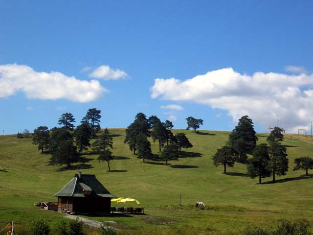 Description:Природне лепоте Златибора author: Snezana Trifunovic Source: self-made